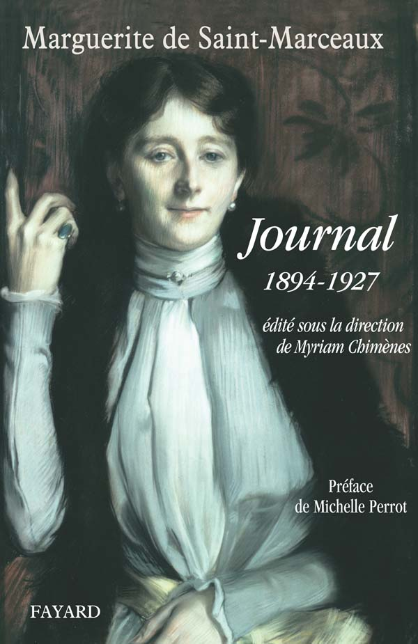 couverture du livre "Journal de Marguerite de Saint-Marceaux" reproduisant un tableau de Jacques-Emile Blanche, mort depuis plus de 70 ans